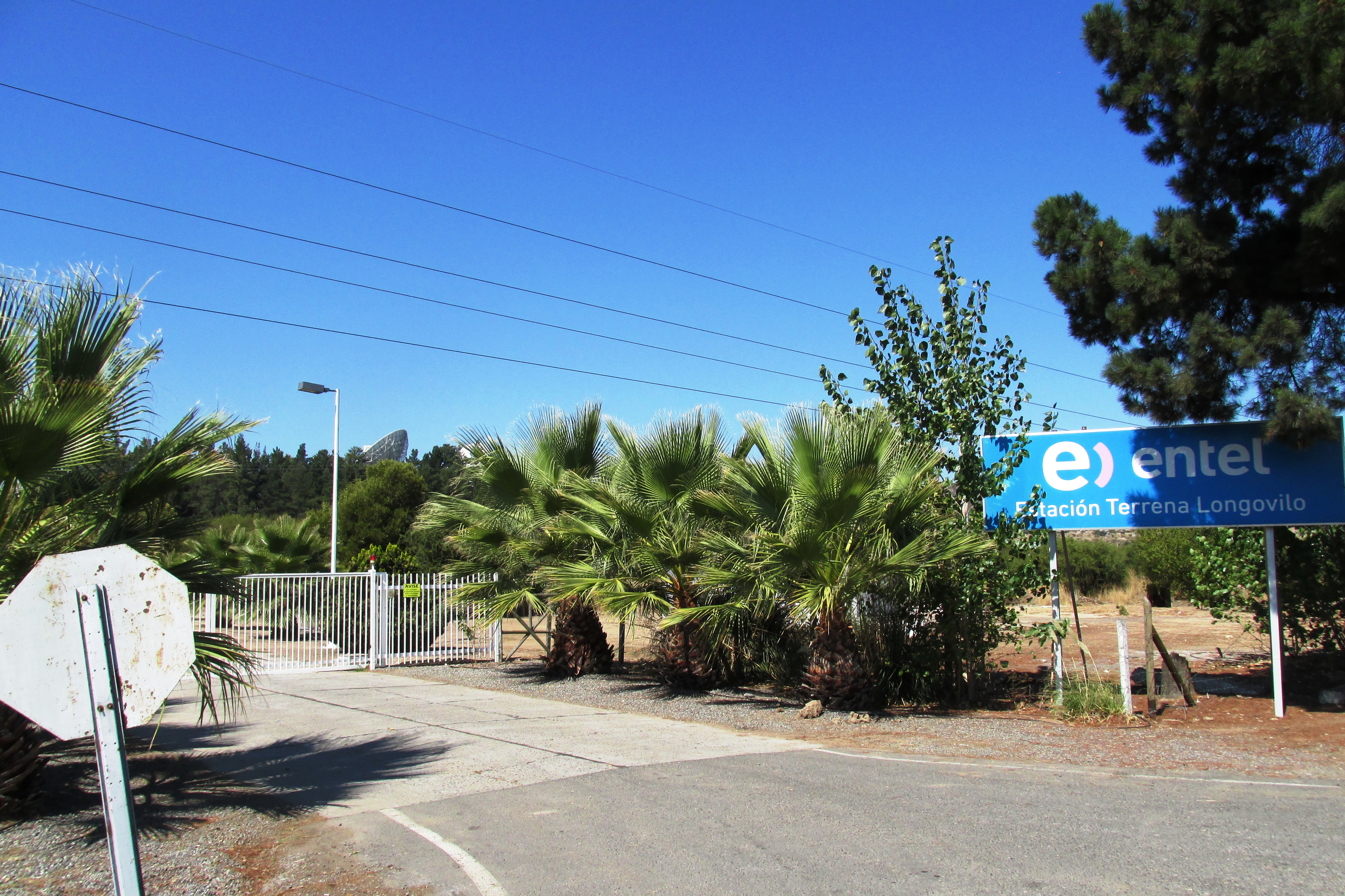 Vista exterior Estación Terrena Longovilo Entel comuna San Pedro Región Metropolitana